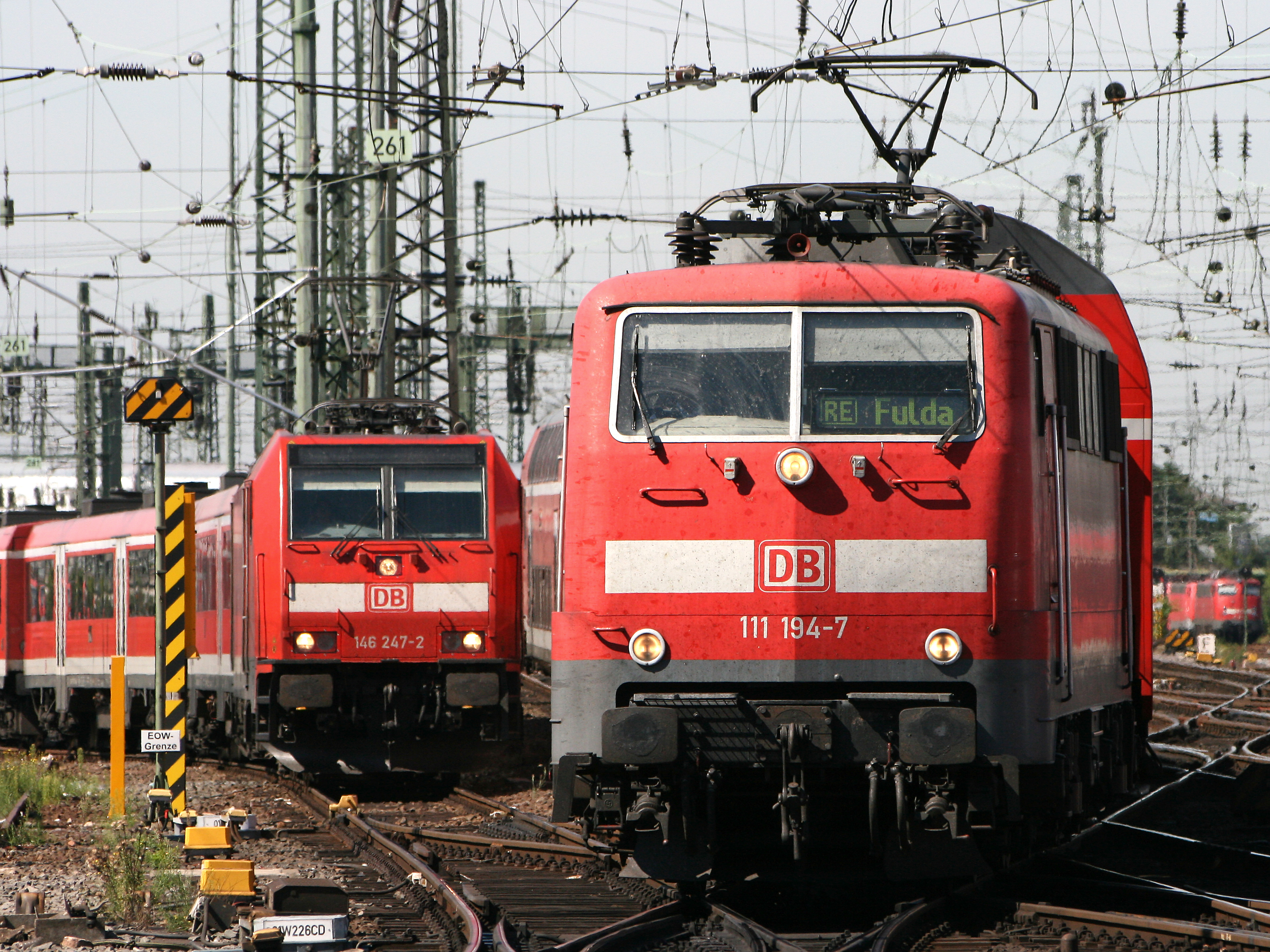 Zwei Nahverkehrszüge der Strecken Frankfurt (Main) - Fulda und Frankfurt (Main) - Aschaffenburg - Gemünden - Würzburg auf dem Gleisvorfeld des Frankfurter Hauptbahnhofes